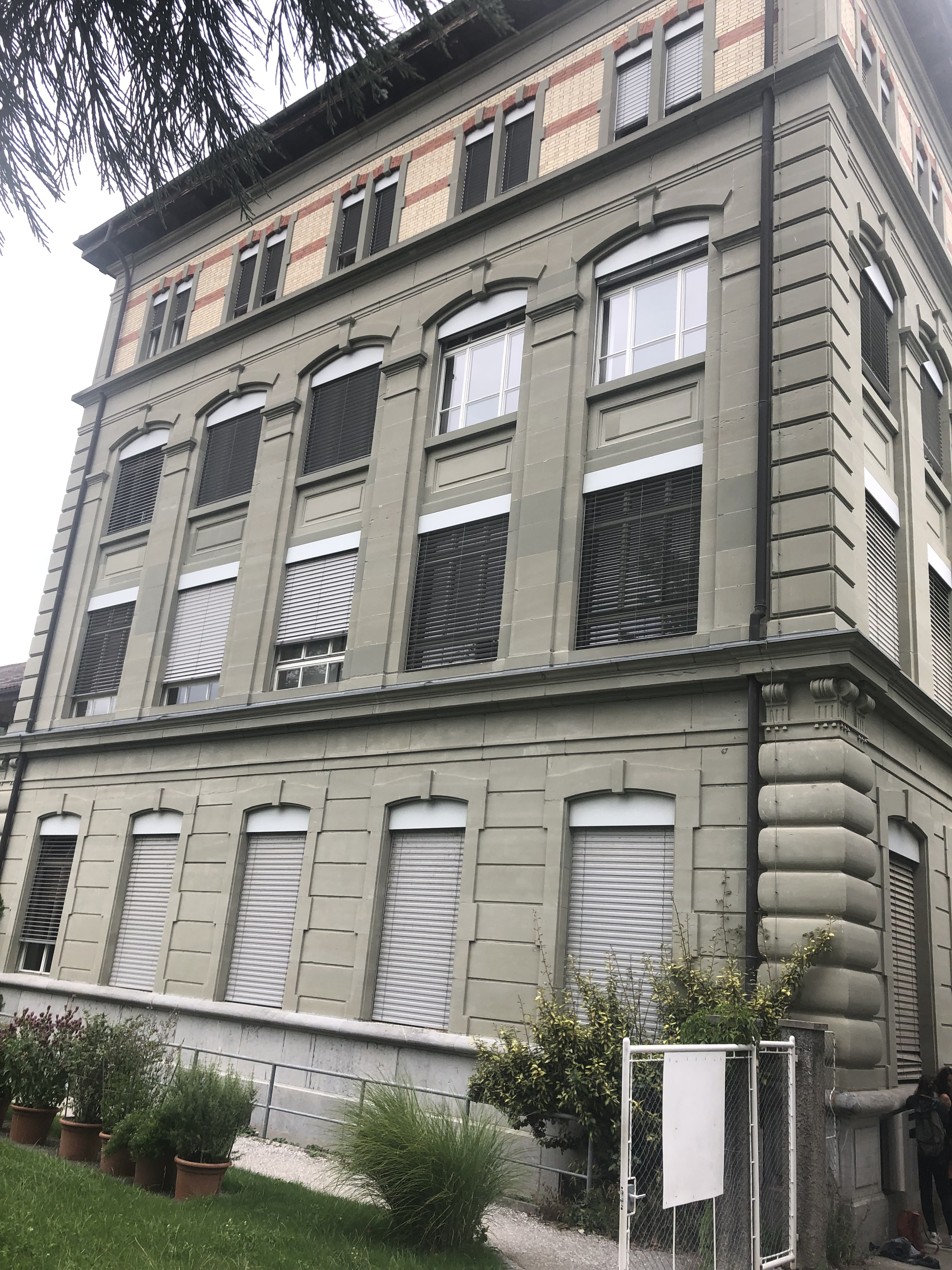 Universität Freiburg (Schweiz): Naturkundemuseum